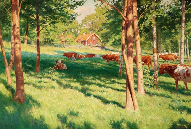 Betande kor vid Schedevi, Tjärstad